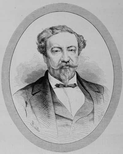 Dr. Lorenzo Montúfar y Rivera en 1876, cuando era embajador de Guatemala en Madrid.